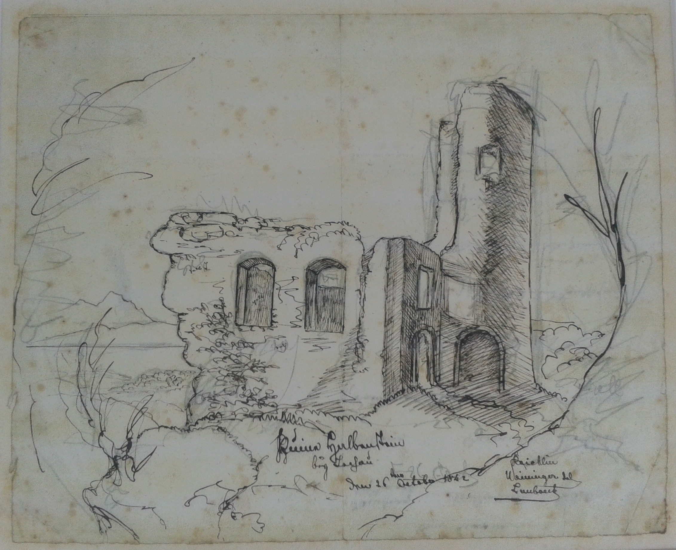 Fotografie einer Bleistiftzeichnung des ehemaligen Ansitzes Halbenstein in Hörbranz-Backenreute (Vorarlberg) am Burgweg zur Ruine Ruggburg, datiert 1842.